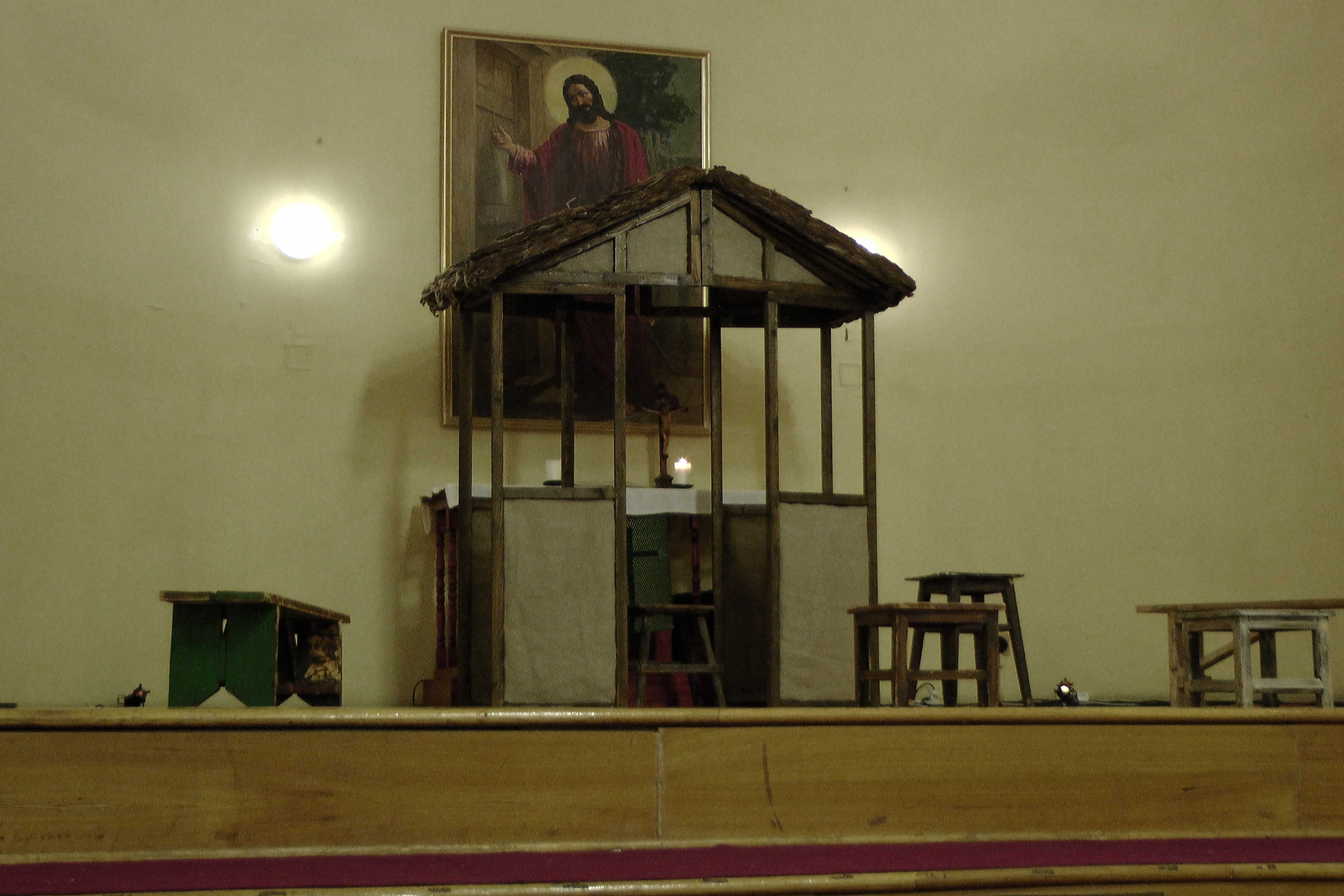 Спектакль театра Mahogany Opera в лютеранской церкви Святой Екатерины. Санкт-Петербург. Июнь 2013 года.